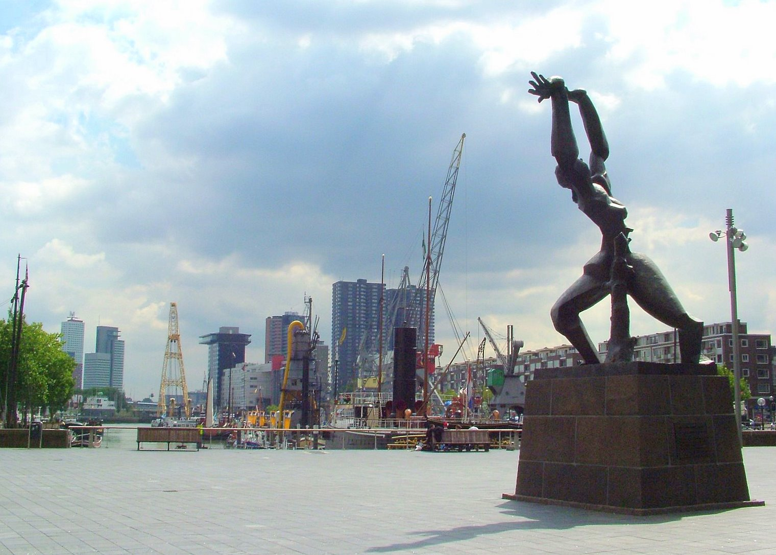 Zadkine monument, Rotterdam.